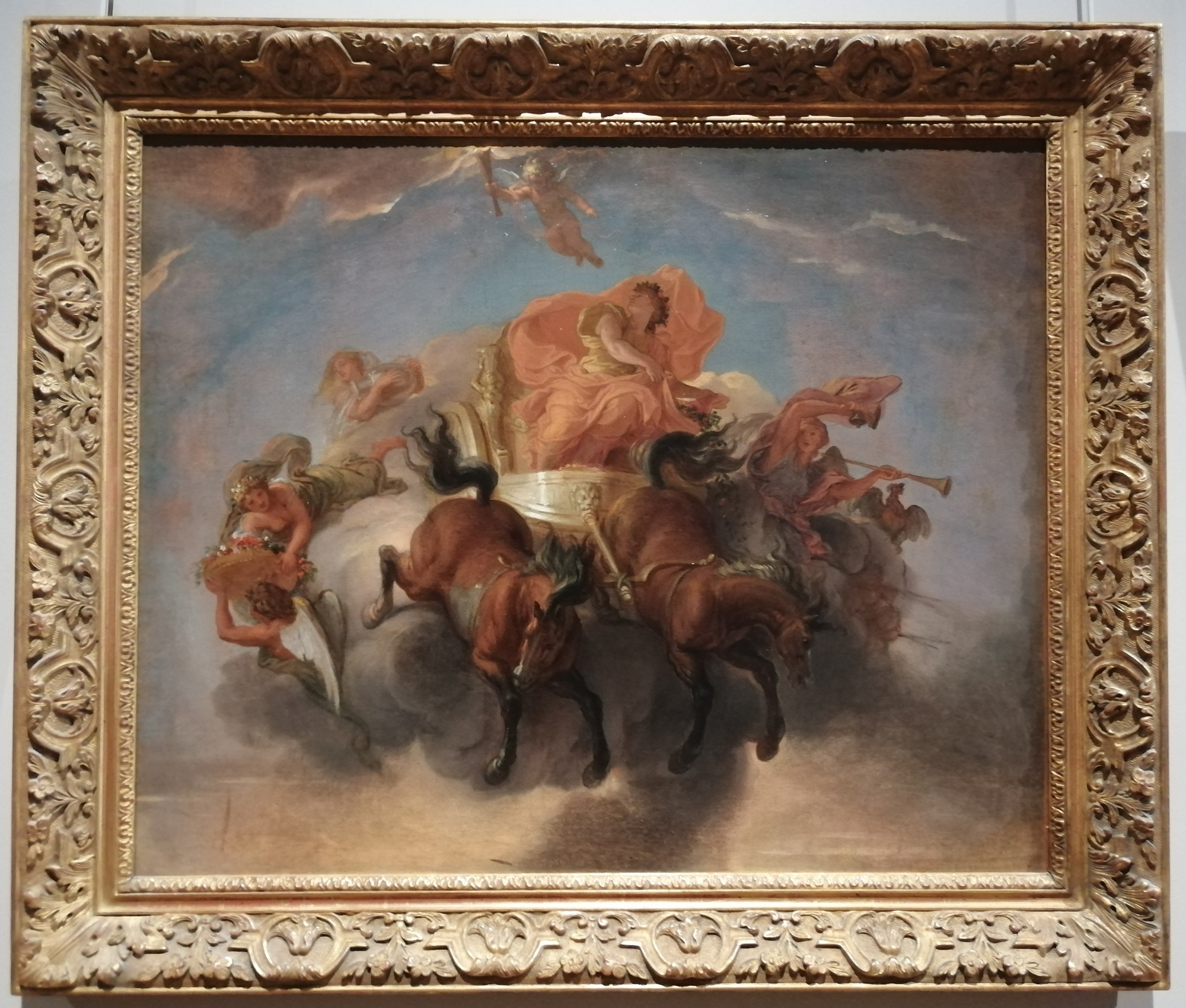 Charles Le Brun (1619-1690) Le Char de l’Aurore, vers 1672 Huile sur toile, 67 x 82 cm Paris, collection particulière Photo : Alexandre Lafore